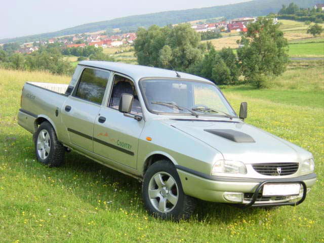 Dacia 1307 Pick-Up DoubleCab 4x4; eigenes Fahrzeug